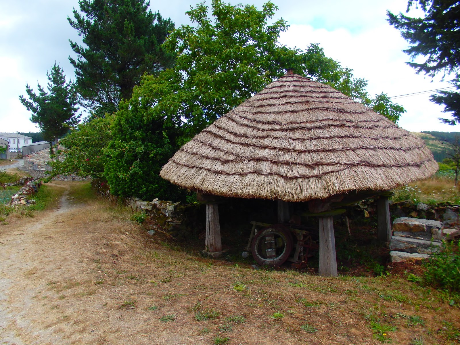 Hórreo na Fontaneira, Baleira.